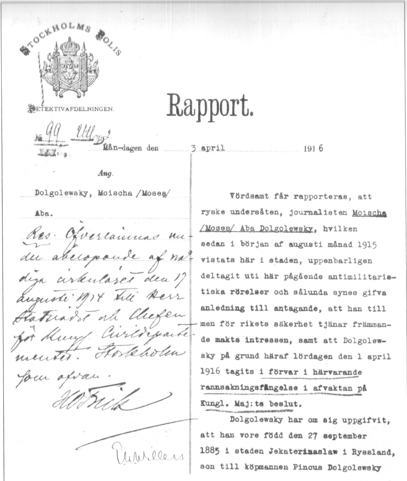 Рапорт стокгольской полиции N99 от 3 апреля 1916 об аресте Мойши Абы Долголевского (Николая Бухарина).